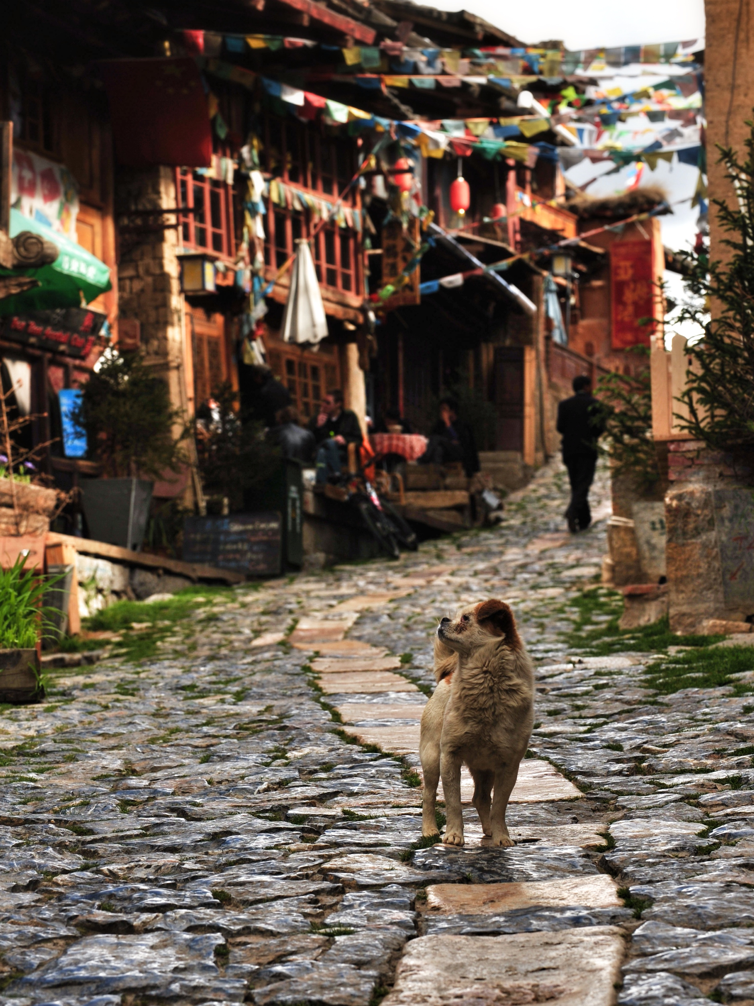 中文（中国大陆）: 在香格里拉，有一座被藏人称作“独克宗”的古城，它是按照佛经中的香巴拉理想国建成的。 古城依山势而建，路面起伏不平，那是一些岁月久远的旧石头就着自然地势铺成的，至今，石板路上还留着深深的马蹄印，那是当年的马帮给时间留下的信物了。 香格里拉古城的初始叫法是“独克宗”，位于香格里拉县东南隅。唐仪凤、调露年间（公元676-679年），土蕃在这里的大龟山顶设立寨堡，名“独克宗”，一个藏语发音包含了两层意思，一为“建在石头上的城堡”，另为“月光城”。后来的古城就是环绕山顶上的寨堡建成的。与此呼应的是在奶子河边的一座山顶上建立的“尼旺宗”，意为“日光城”，其寨堡已经没有了，原址上是一座白塔。 独克宗古城位于云南省迪庆藏族自治州香格里拉县，距今已有1300多年的历史。“独克宗”藏语寓意为“月光城”，曾是“茶马古道”上的重镇。